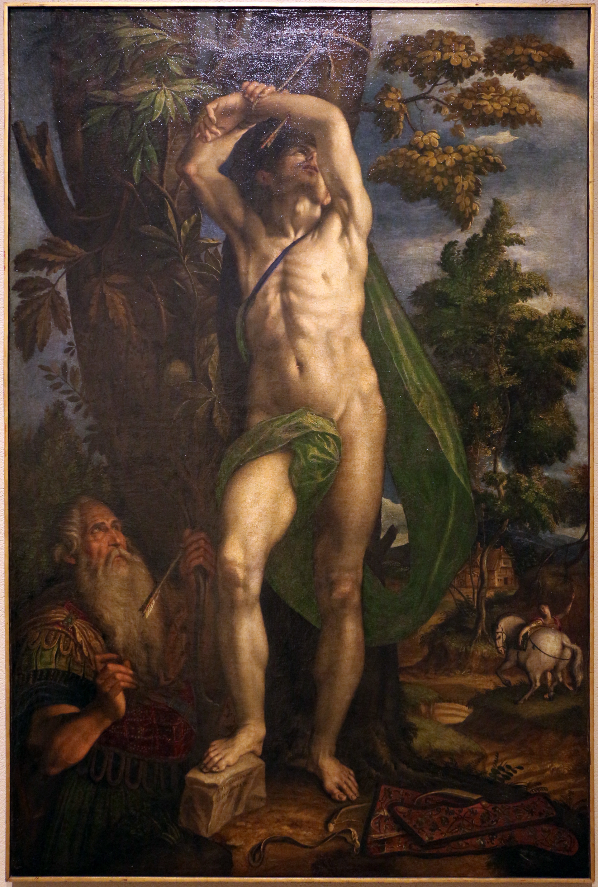 Martyrdom of S. Sebastian=martirio di san sebastianolabel QS:Len,"Martyrdom of S. Sebastian=martirio di san sebastiano" label QS:Lde,"Das Martyrium des Sankt Sebastian"